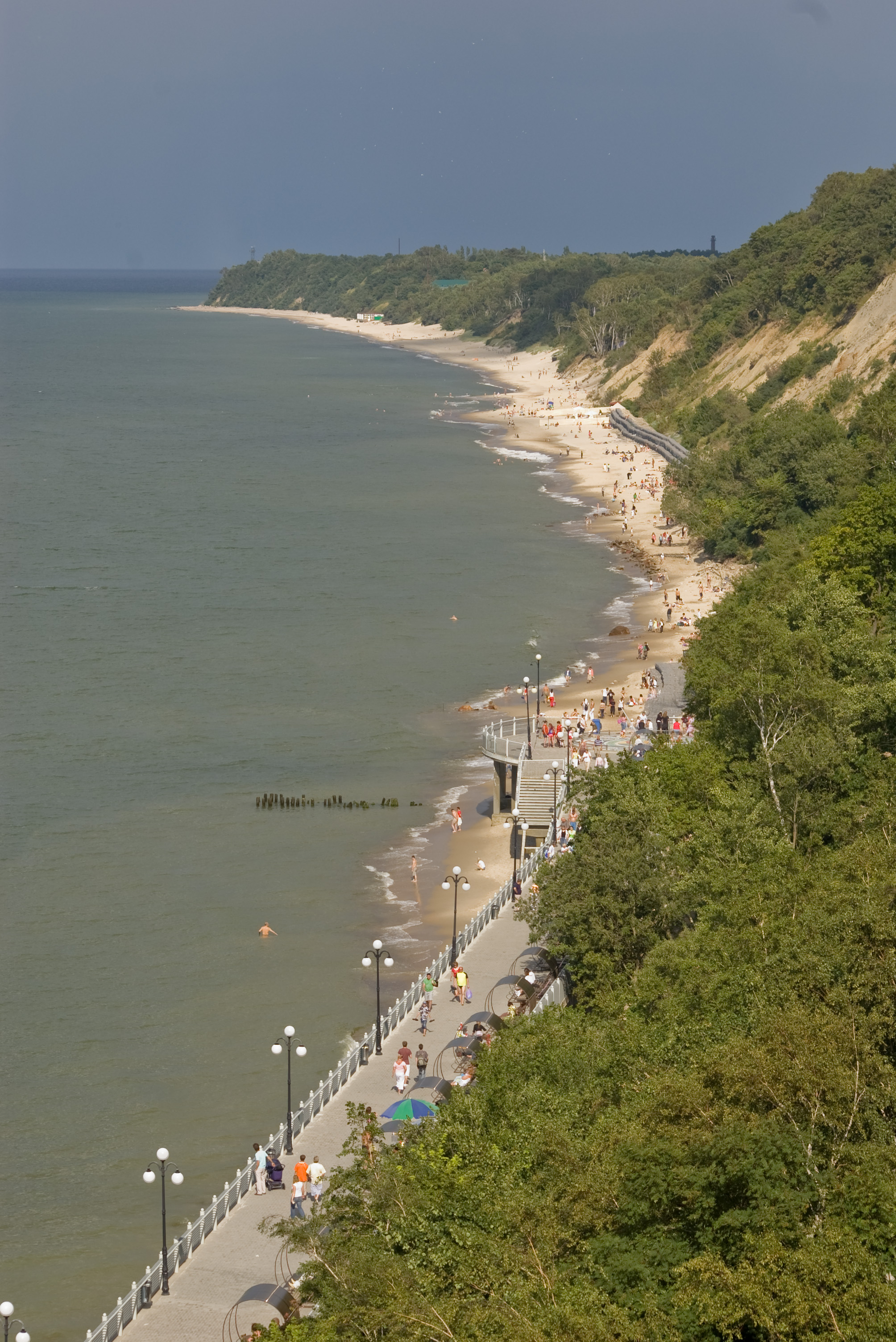 Набережная Светлогорска (Калининградская область). Вид со смотровой площадки лифта. 2008 г.